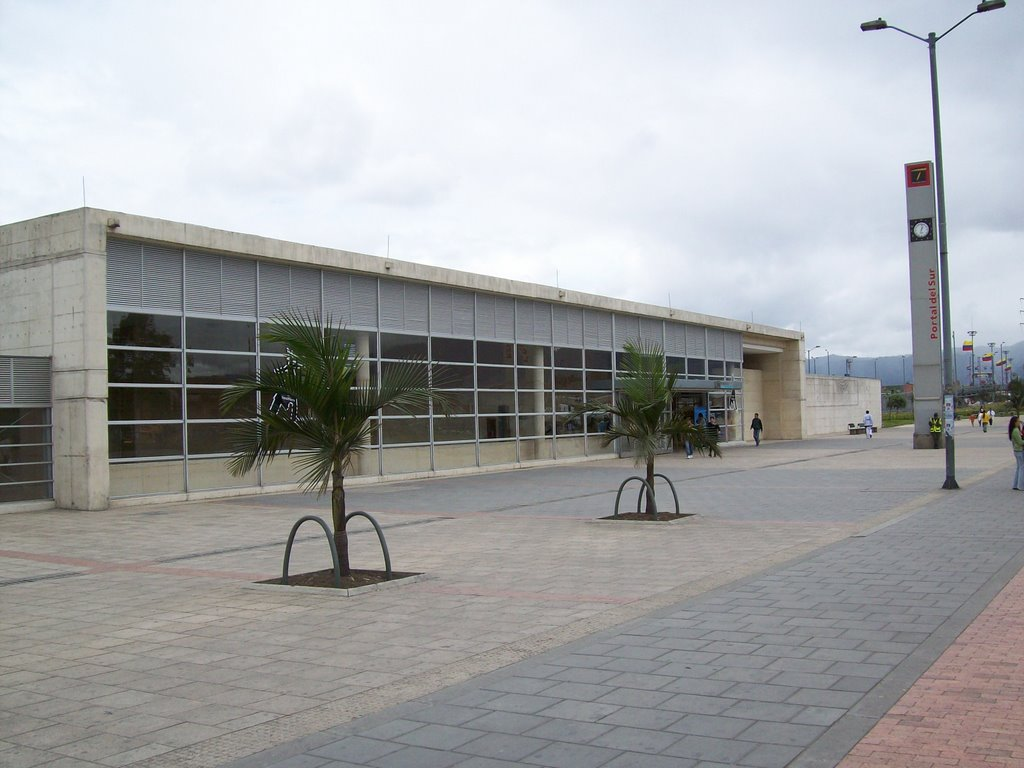 PortaldelSur